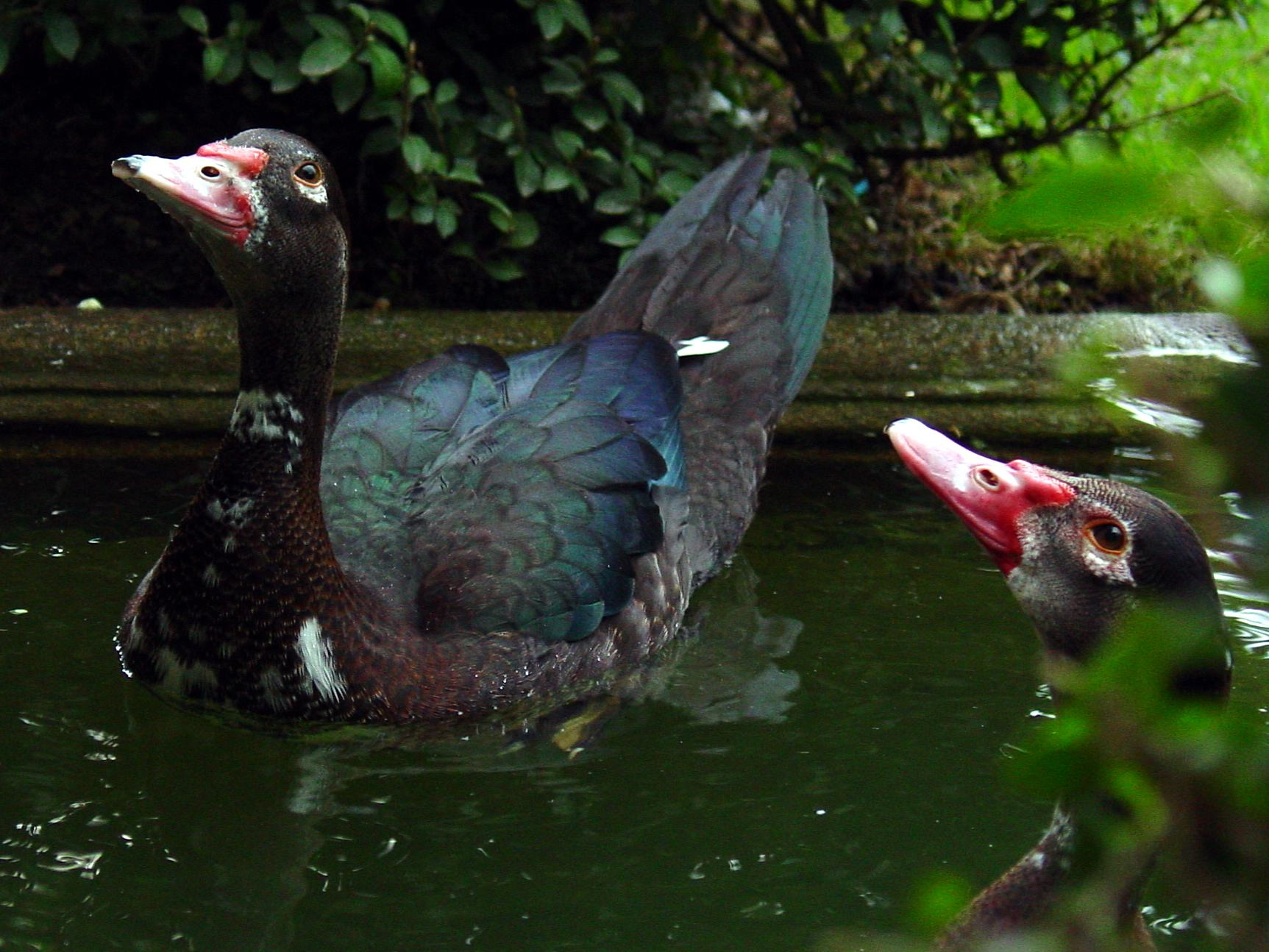 self made.